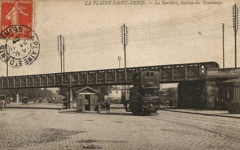 Saint-Denis.Plaine Saint-Denis.Pont Hainguerlot.Station des tramways